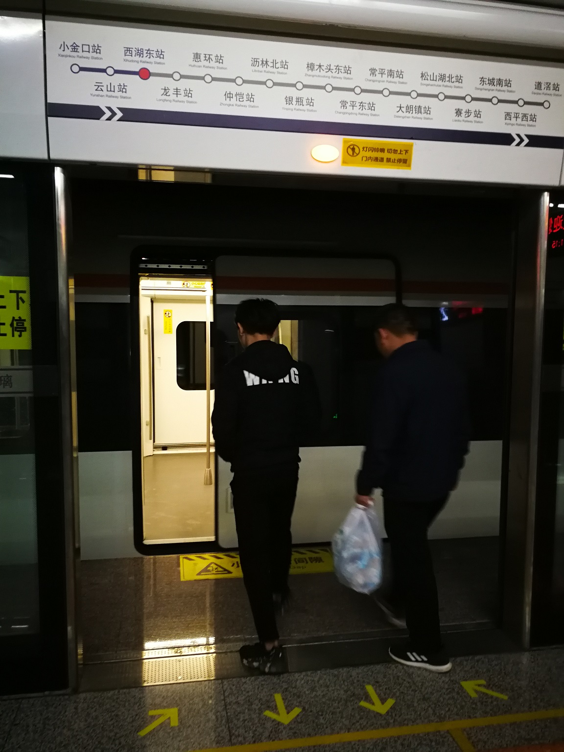 莞惠城铁西湖东站，正在上车的旅客